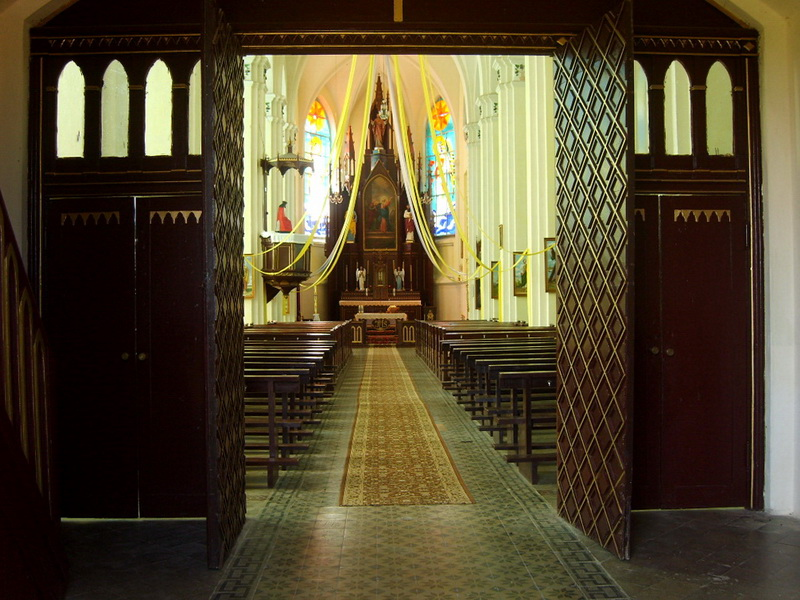 Альковічы. Інтэр'ер касцёла